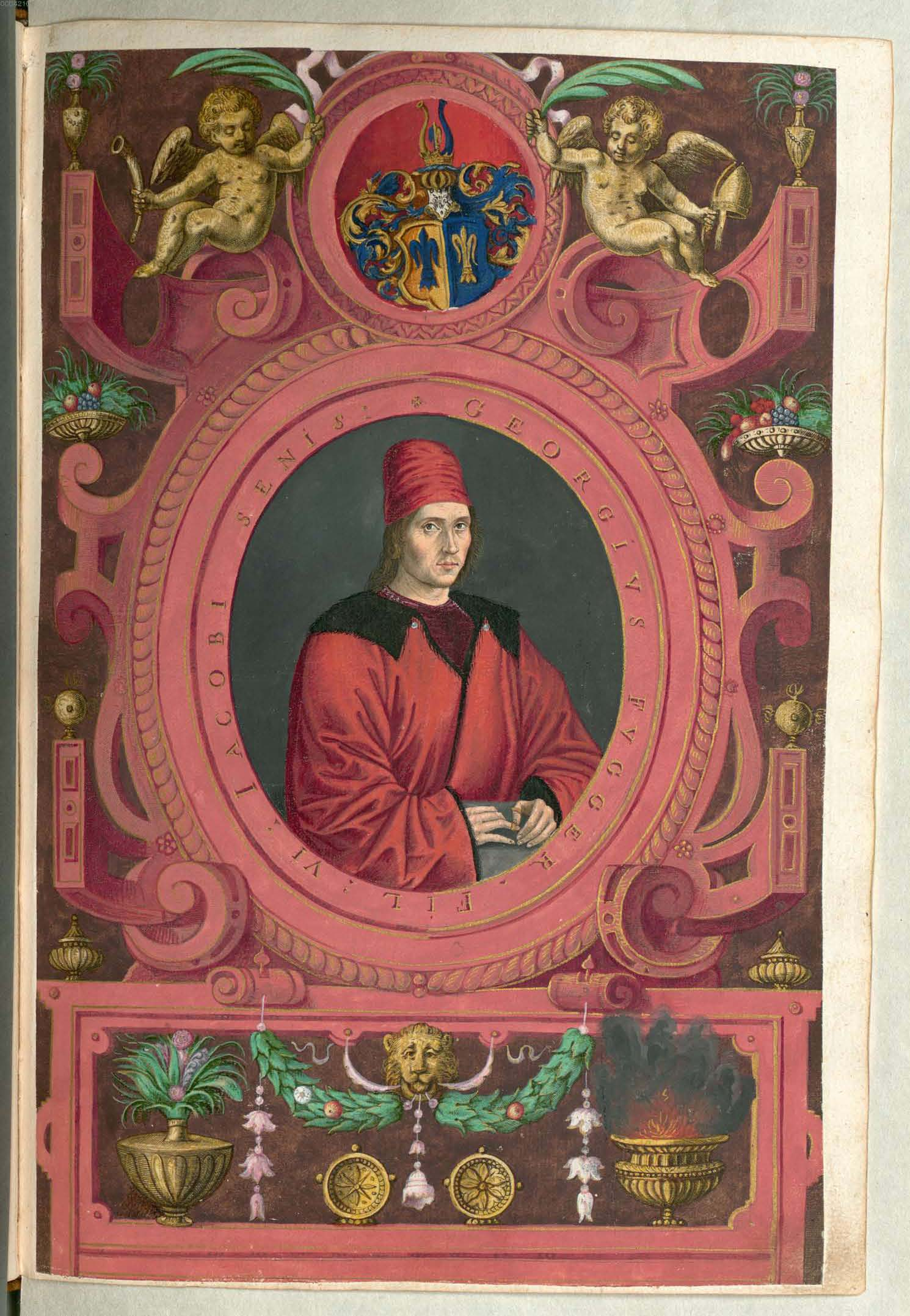 Fuggerorum et Fuggerarum imagines wurde 1588 von Philipp Eduard Fugger beim Kupferstecher Dominicus Custos in Auftrag gegeben. Das Werk enthält mit Aquarell- und Gouache-Farbe kolorierte Stiche der Mitglieder der Fugger von der Lilie. Der Druck von 1618 stellt das einzige kolorierte Exemplar dar. Georg Fugger (1453-1506), Sohn des Jakob Fugger d. Ä. (1398-1469)